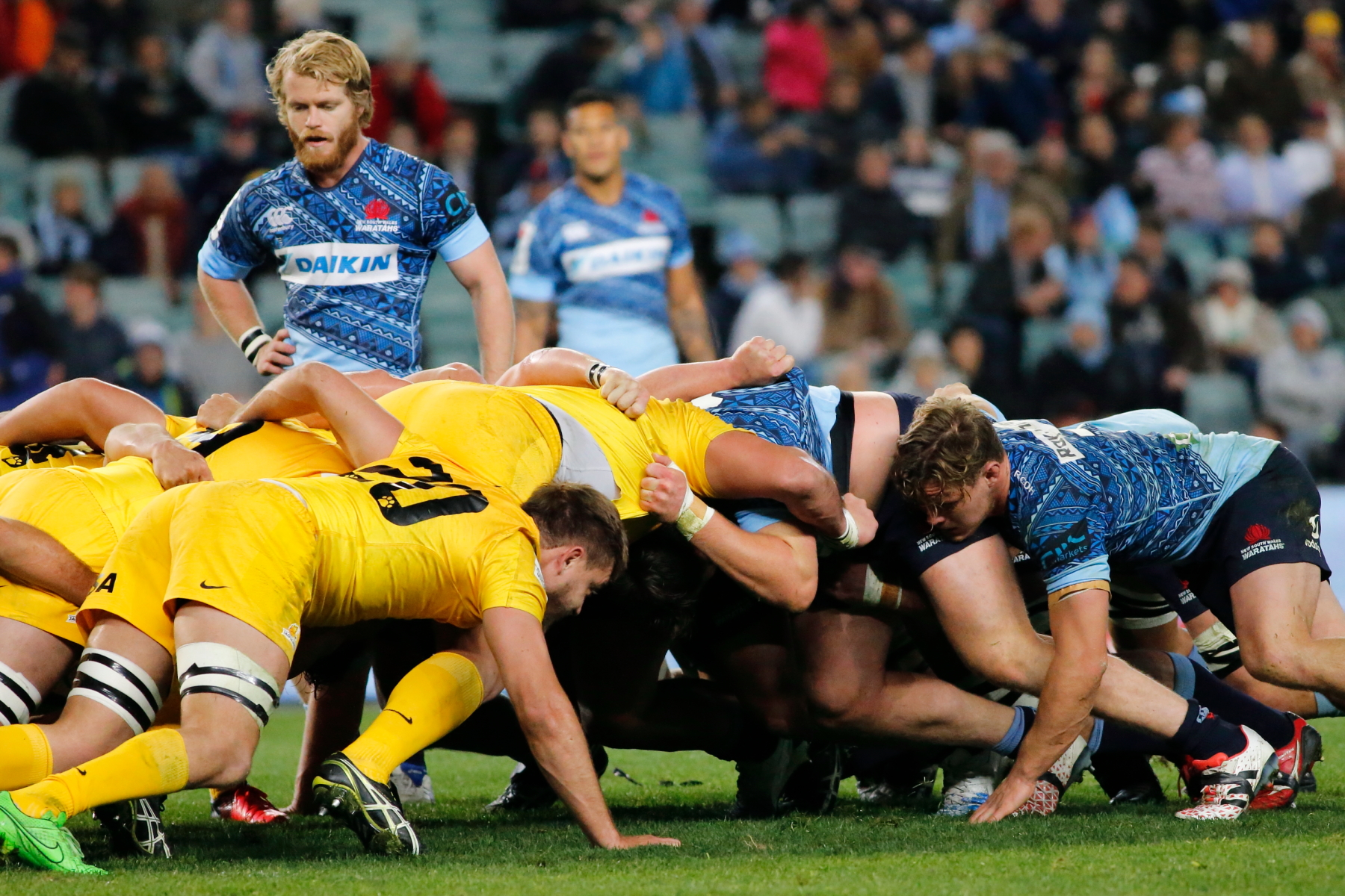 2017.07.08.21.33.36-WARvJAG-0001